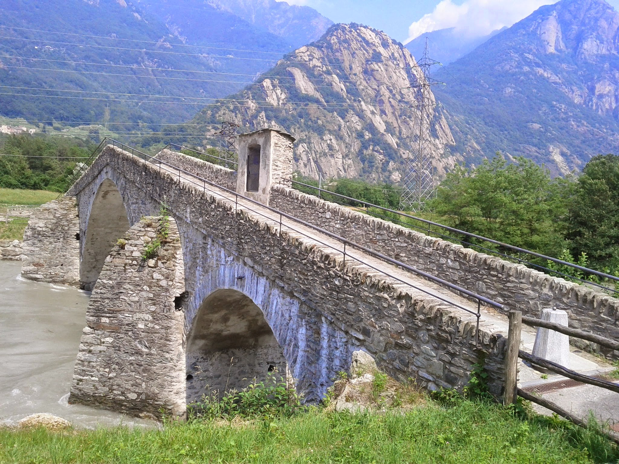 vers Arnad